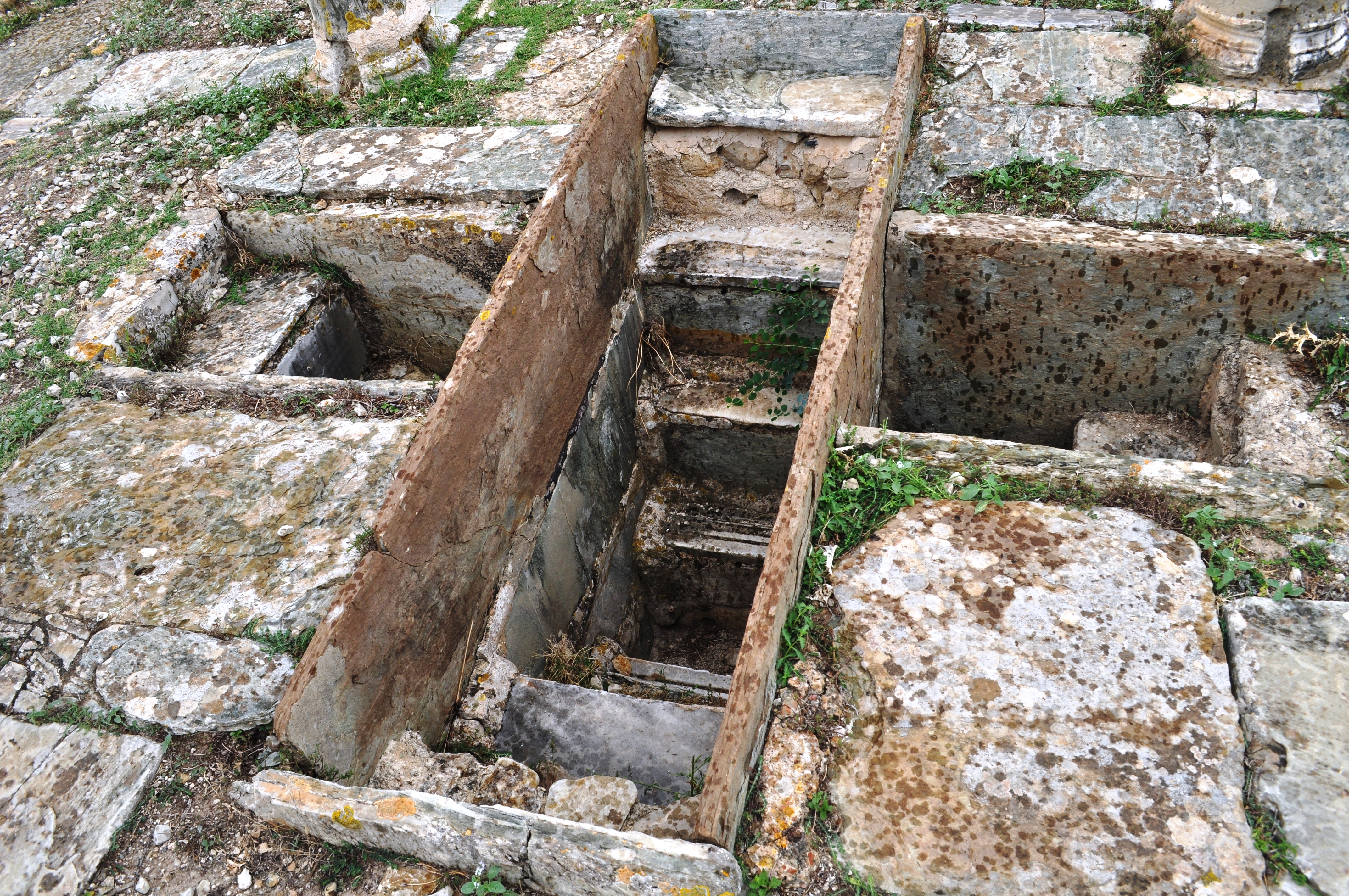 Église du prêtre Alexandre et grand monument qui en est voisin